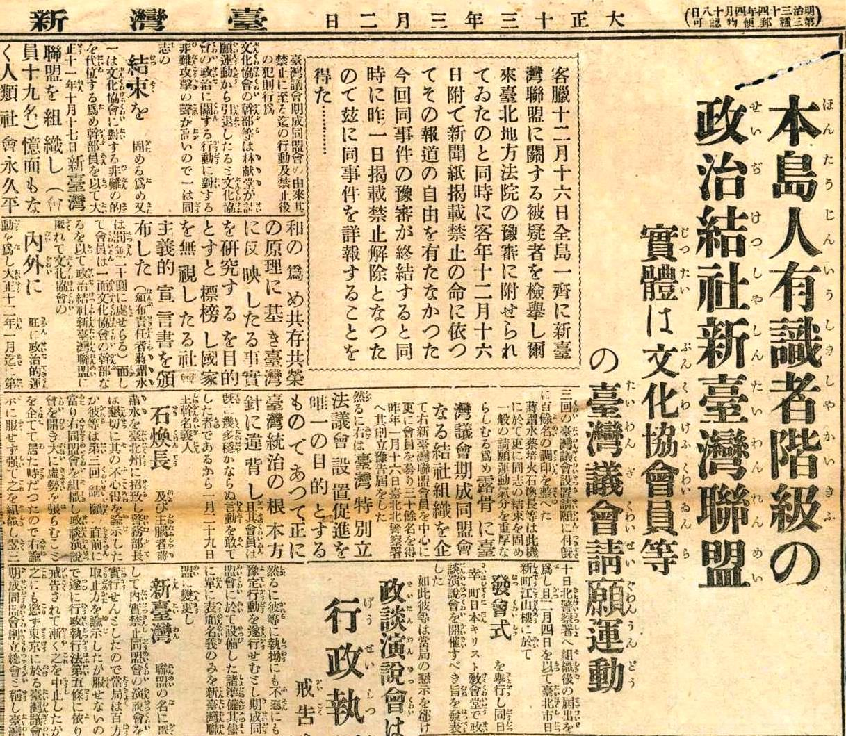 中文（台灣）: 1924/03/02